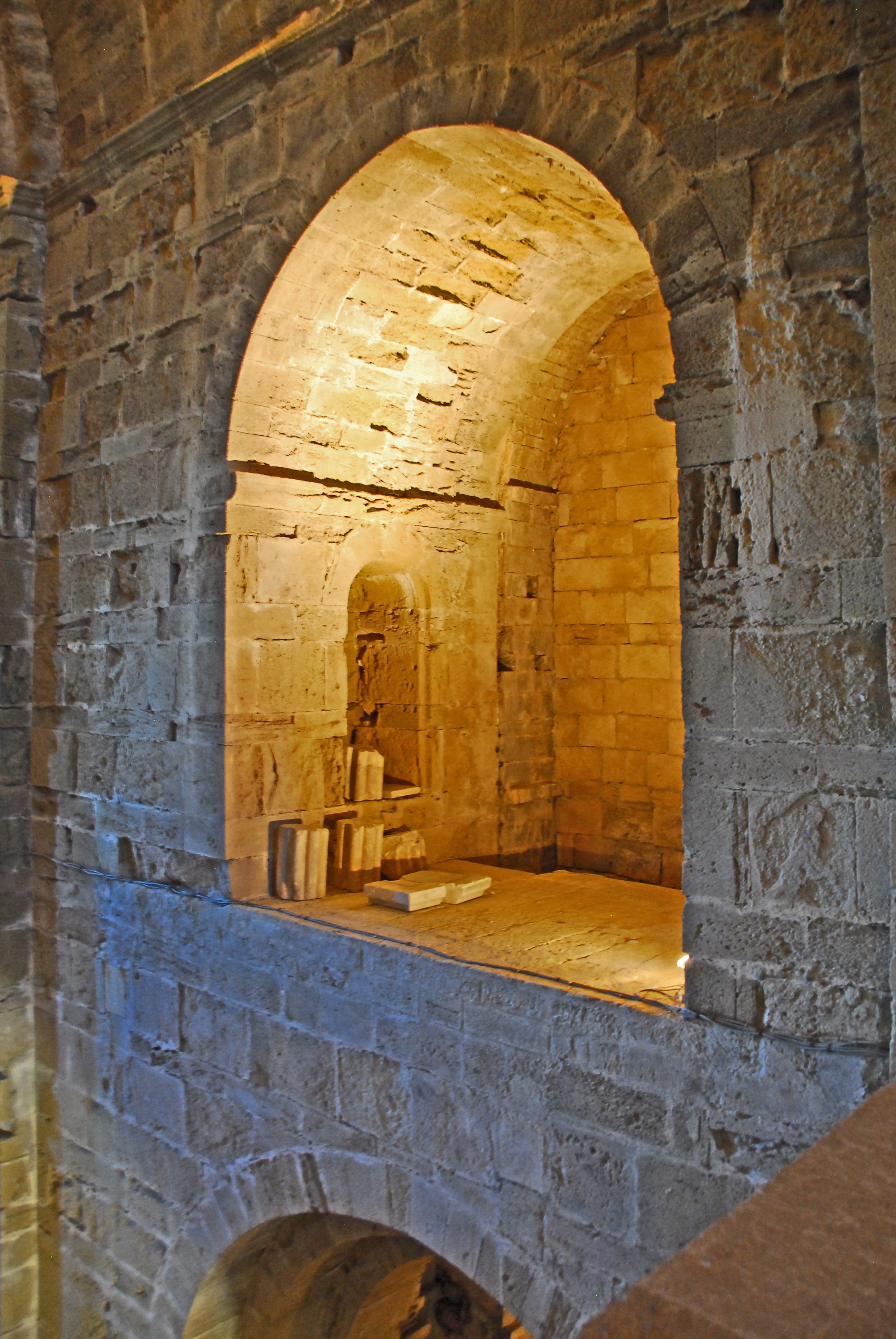 St-Pierre-et-St-Paul de Maguelone, südl. Hochkapelle